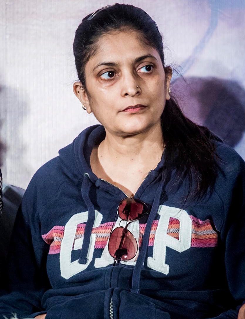 Sudha Kongara Prasad at Irudhi Suttru Thanks Giving Meet